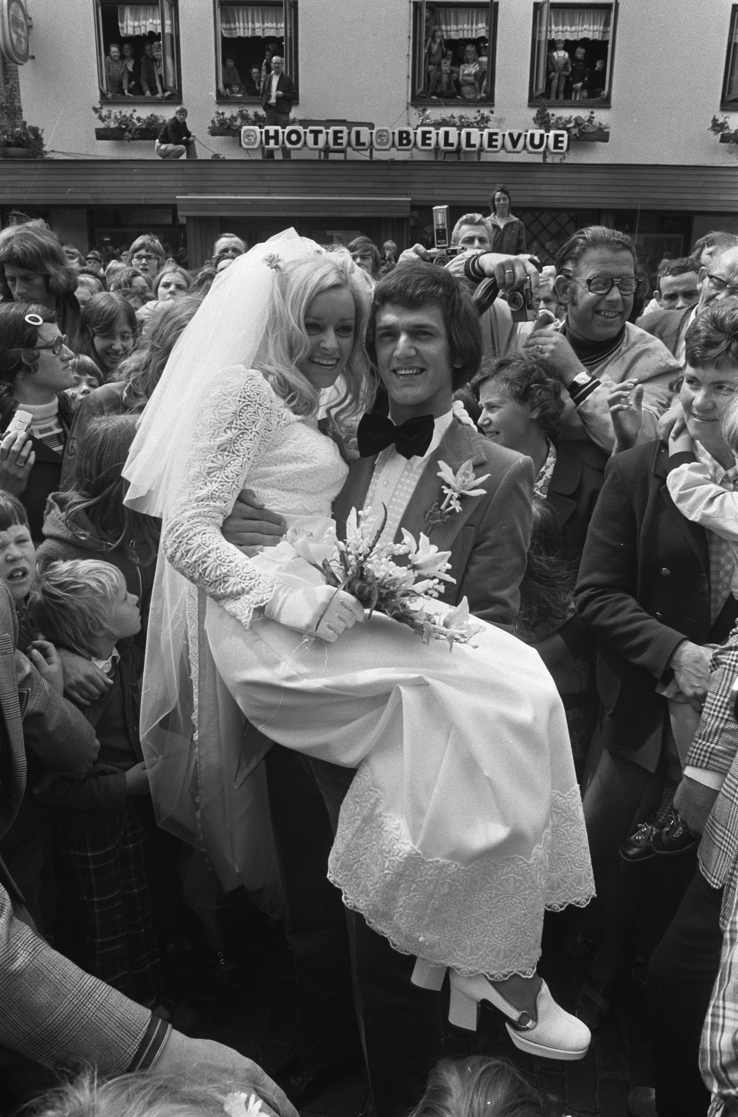 Collectie / Archief : Fotocollectie Anefo Reportage / Serie : [ onbekend ] Beschrijving : Zangeres Corry Konings (voorheen van de Rekels) getrouwd met Piet Roelen in Chaam, Corry wordt door bruidegom gedragen Datum : 27 juli 1973 Locatie : Chaam Trefwoorden : huwelijken, zangers Persoonsnaam : Konings, Corry, Roelen, Piet Fotograaf : Verhoeff, Bert / Anefo Auteursrechthebbende : Nationaal Archief Materiaalsoort : Negatief (zwart/wit) Nummer archiefinventaris : bekijk toegang 2.24.01.05 Bestanddeelnummer : 926-5736